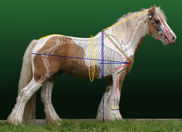 Vermessungspunkte für die Datenerfassung der THAICS e.V.